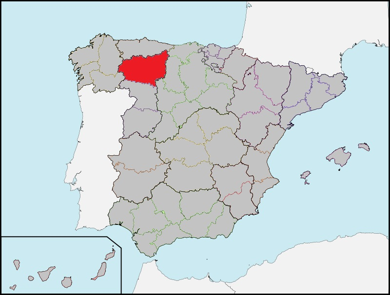 Ubicación de la provincia de León en la España de los años treinta